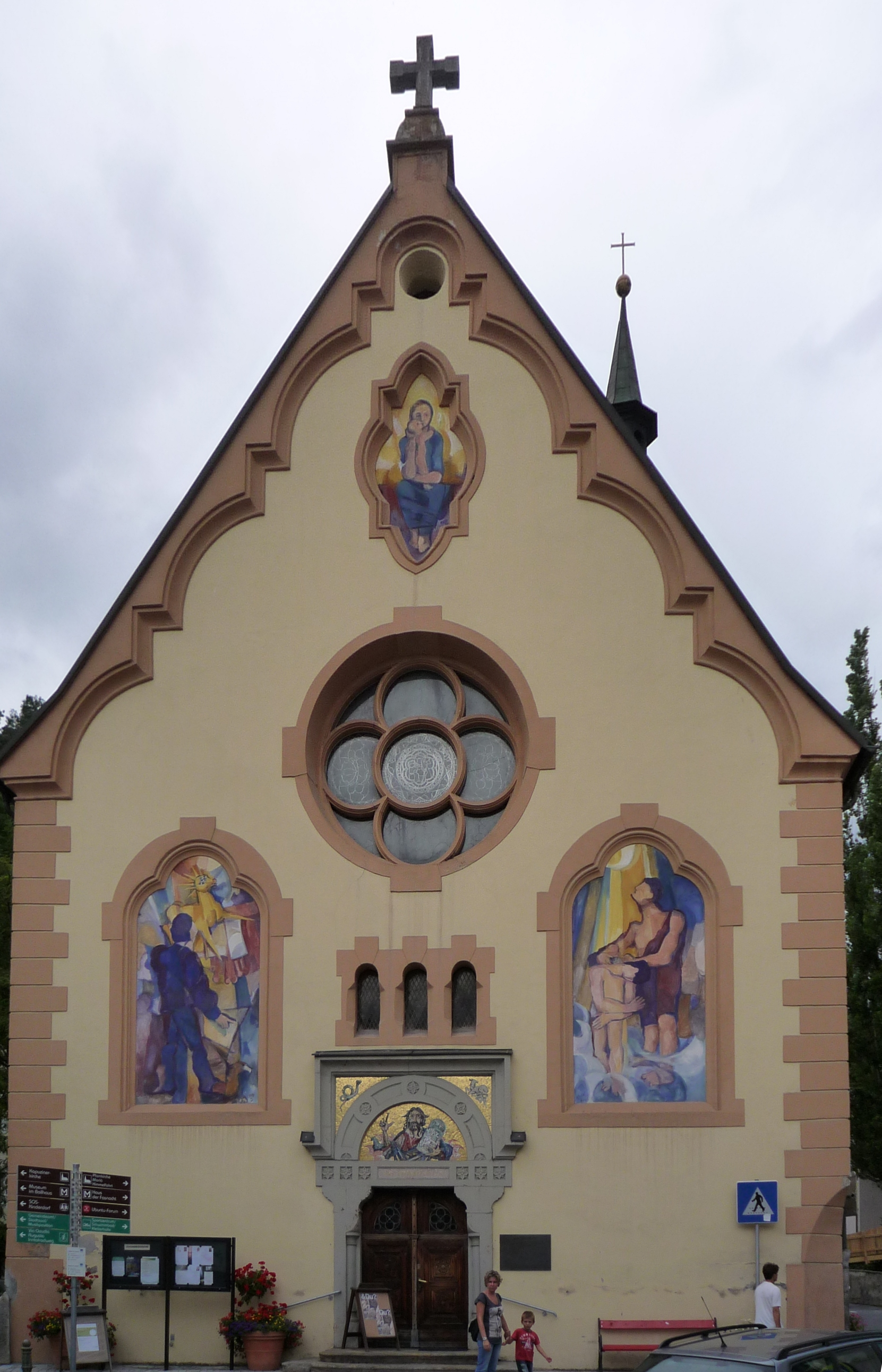 Façade de l’église Saint-Jean à Imst (Tirol).